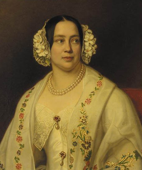 Amalie von Württemberg (1789-1848), Herzogin von Sachsen-Altenburg